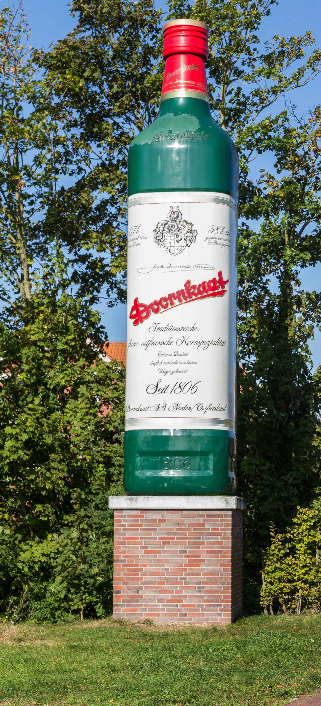 Norden (Ostfriesland) ehrt Doornkaat